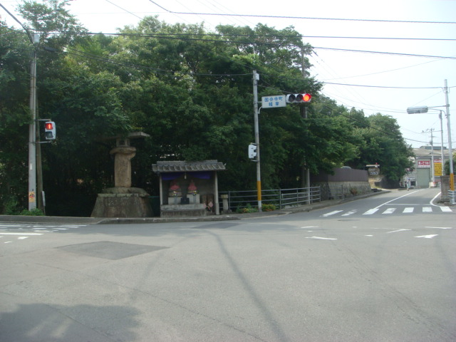 香川県道39号と282号の交差点（高松市国分寺町福家）